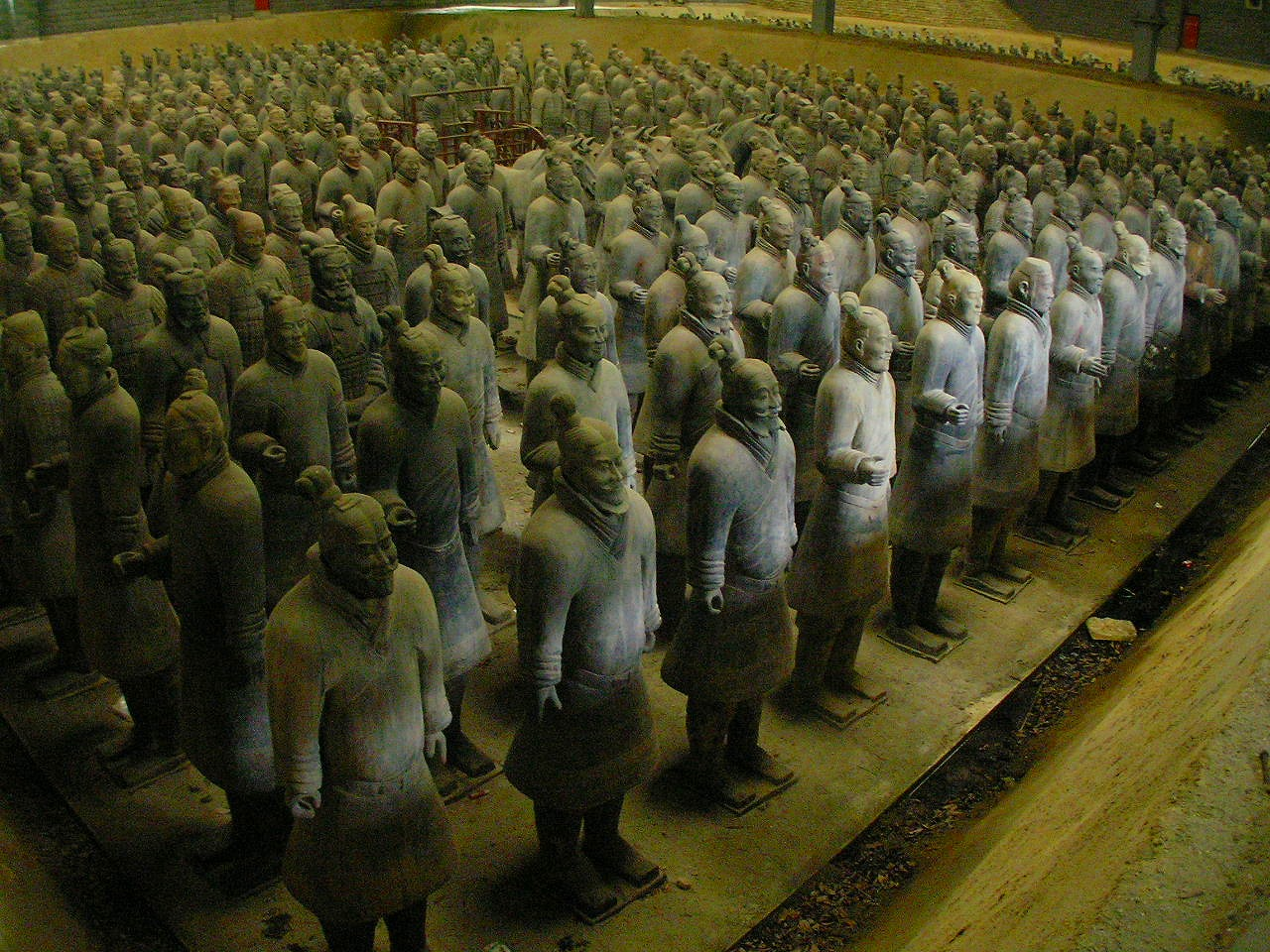 太陽公園兵馬俑博物館